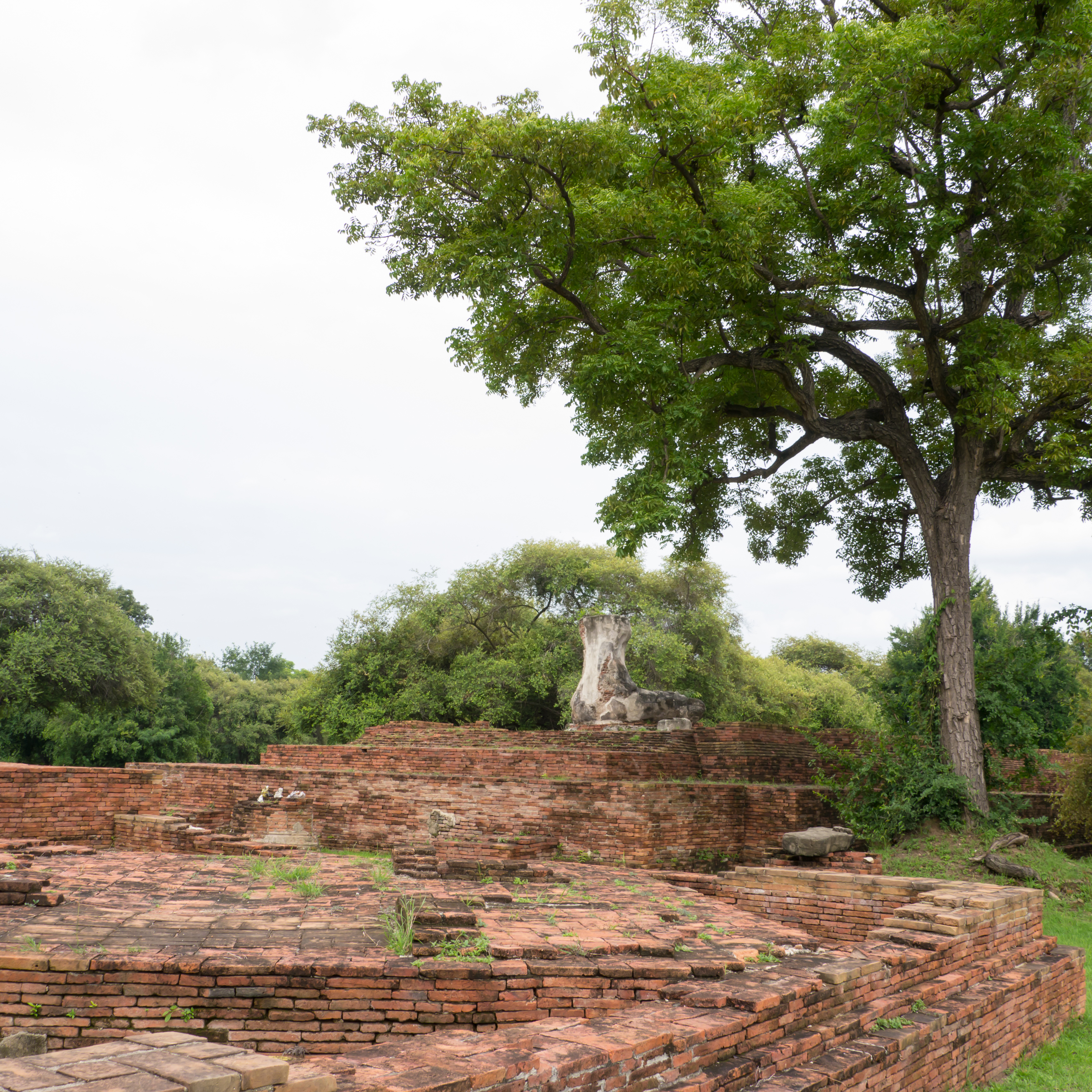 วัดวังชัย